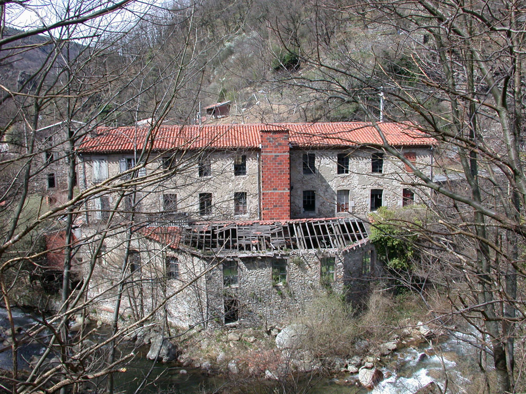 Ancienne filature et foulon de Vignarnette, construite a partir de 1854 par Euphrasie Goutines veuve Farguès et son gendre Henri Mestre, fabricants de draps et molletons à Mazamet au lieu-dit la Vignarnette dans la vallée de l'Arnette. Plus tard filature Pierre Julié, reconvertie en délainage vers 1930 par Jean Brenac. Récemment démolie. Photographie Denis Armengaud, avril 2005.